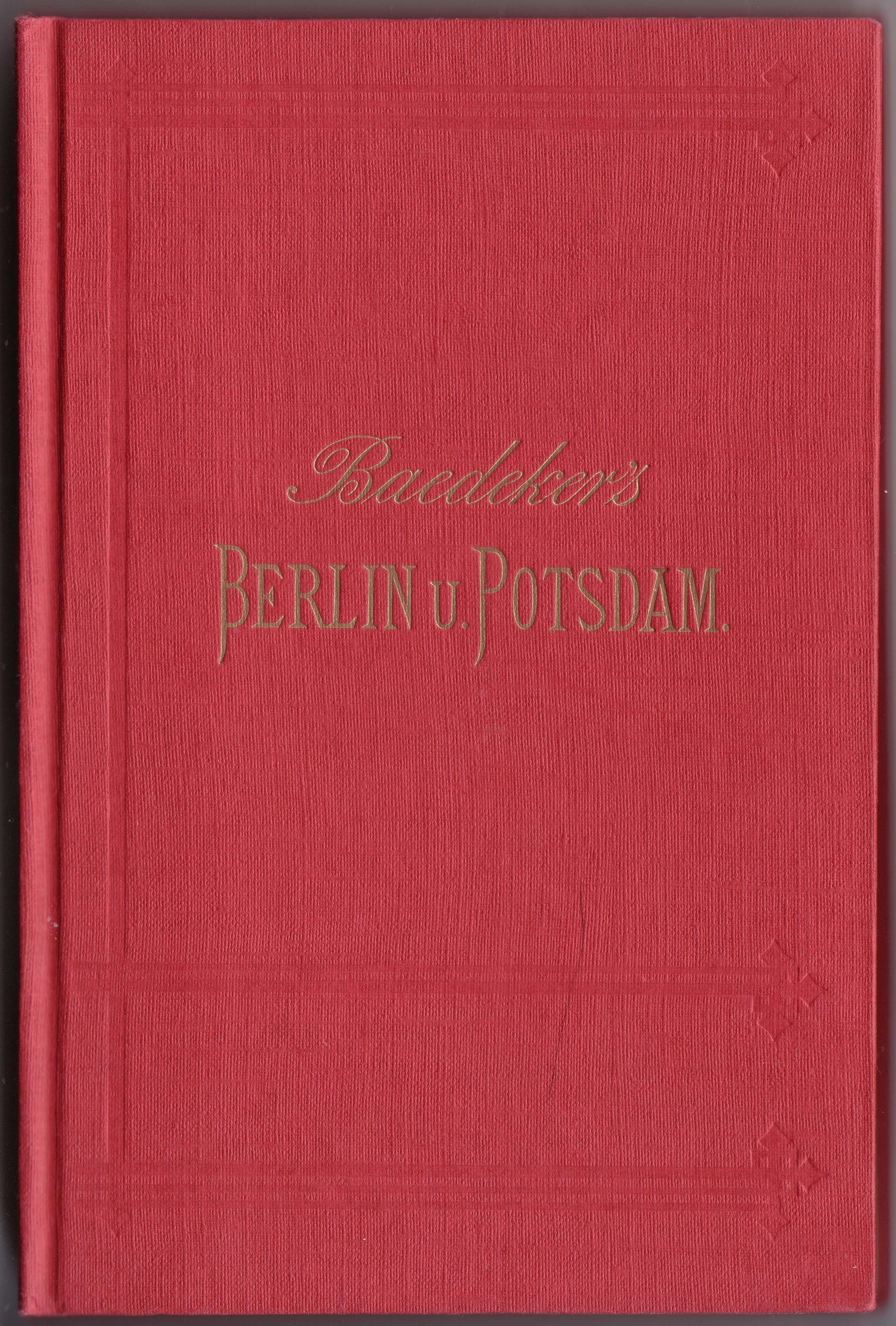 Baedekers Berlin und Potsdam 1878 (Reprint).JPG